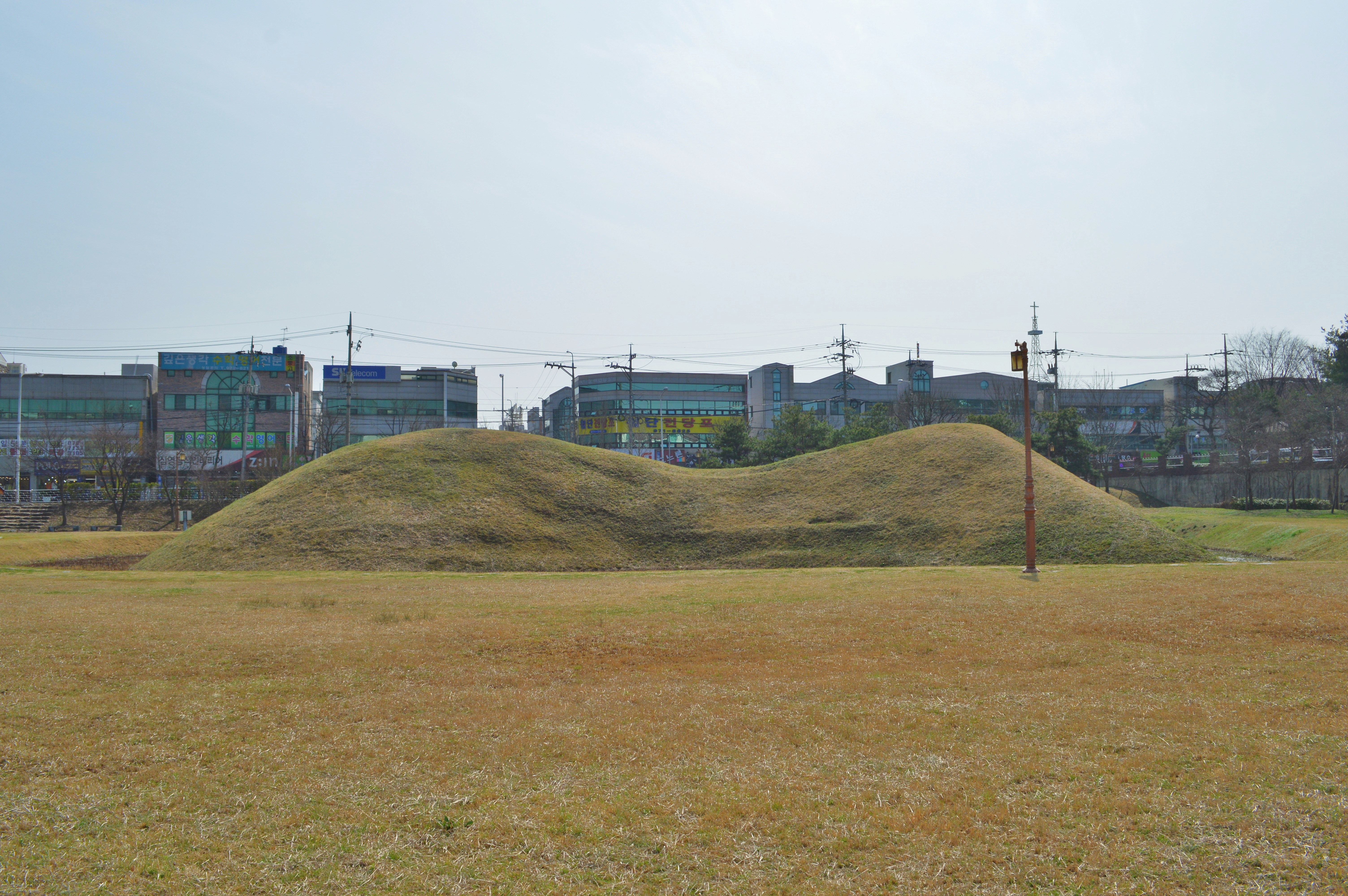 光州月桂洞1号墳 横から